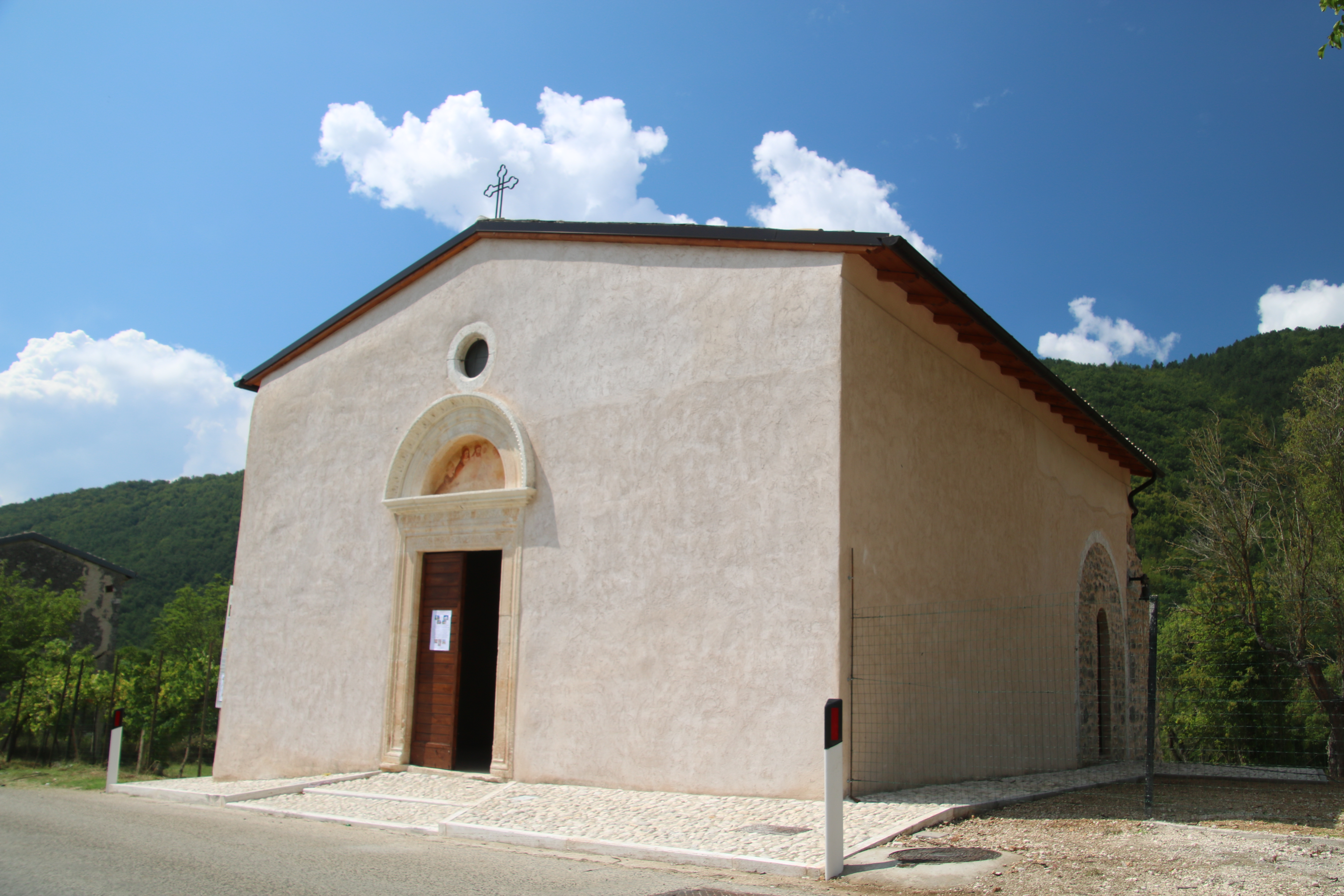 Chiesa di San Sebastiano (Rosciolo dei Marsi)